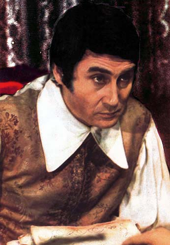 El actor argentino Rodolfo Bebán en la telenovela "El gato" (1976)